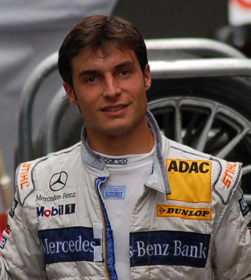 Bruno Spengler in Oschersleben 2009 (DTM)